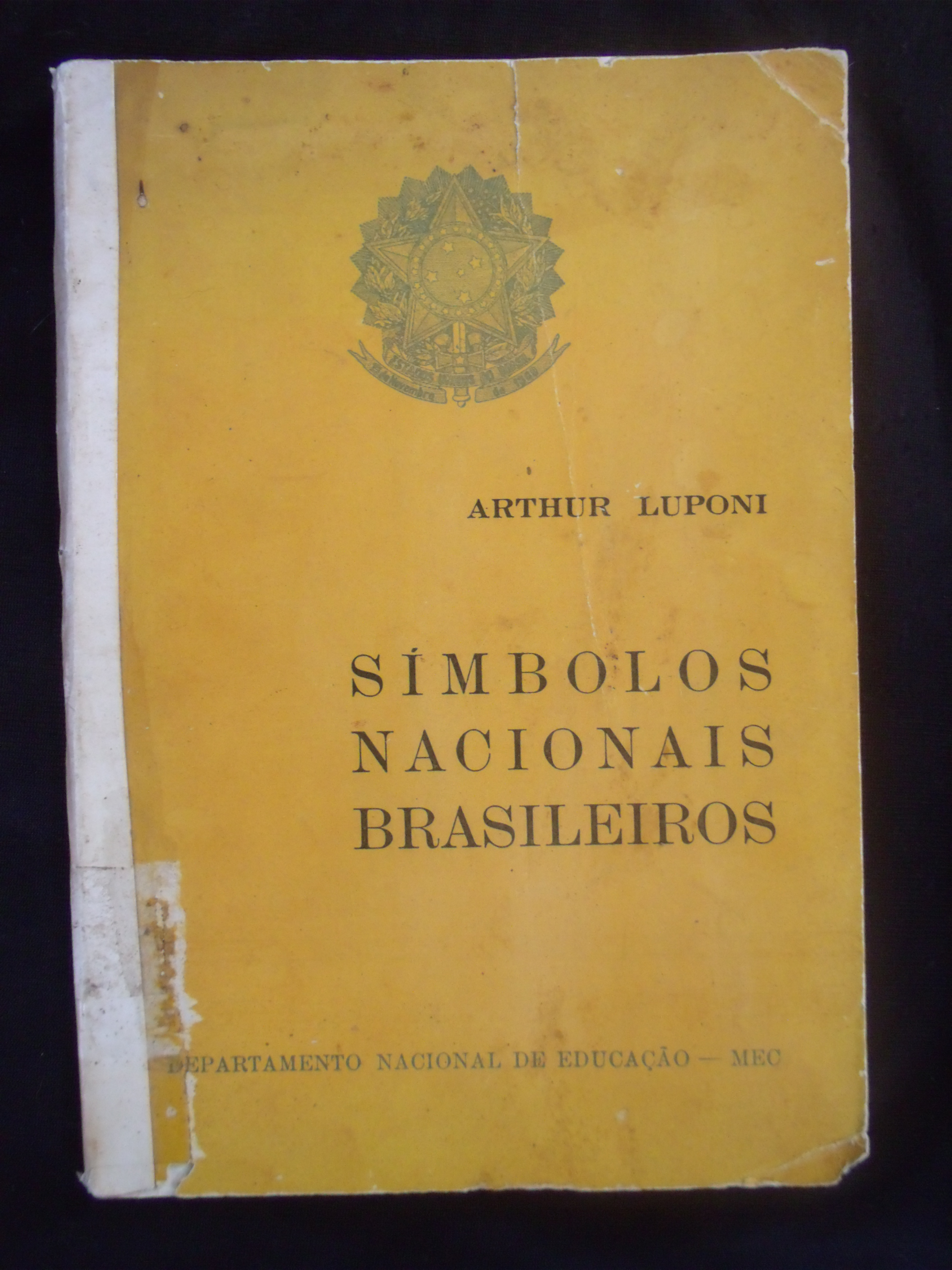 Livro que foi feito pelo Departamento Nacional de Educação , sob direção de Artur Luponi, sobre os Símbolos Nacionais do Brasil. A Edição é de 1942, mas essa da imagem é um,a reimpressão feita em 1960. Eis a referência da primeira impressão: LUPONI, Artur – Símbolos Nacionais Brasileiros – Departamento Nacional de Educação – MEC – Tipografia Edanee S. A. – São Paulo. 1942.